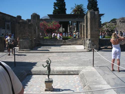 Помпеи. Танцующий фавн